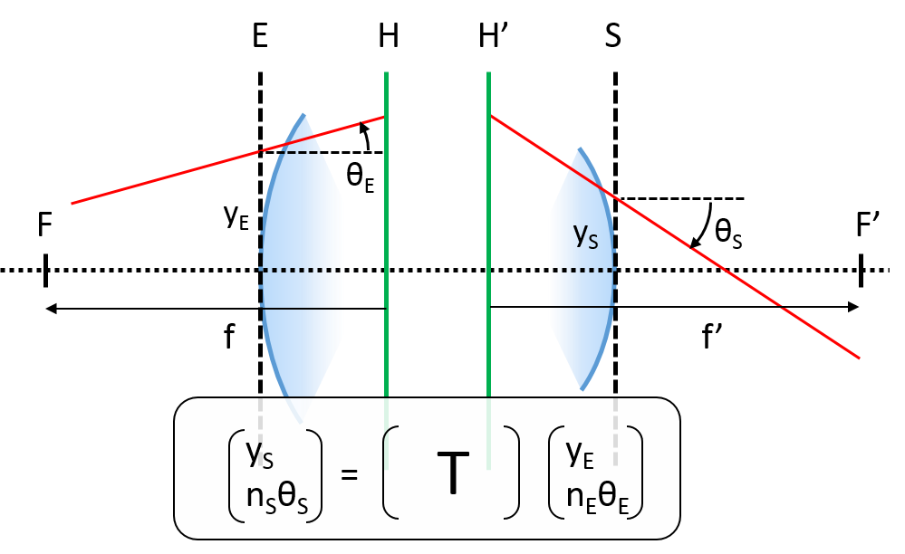 Schéma explicatif pour la définition d'une matrice de transfert optique